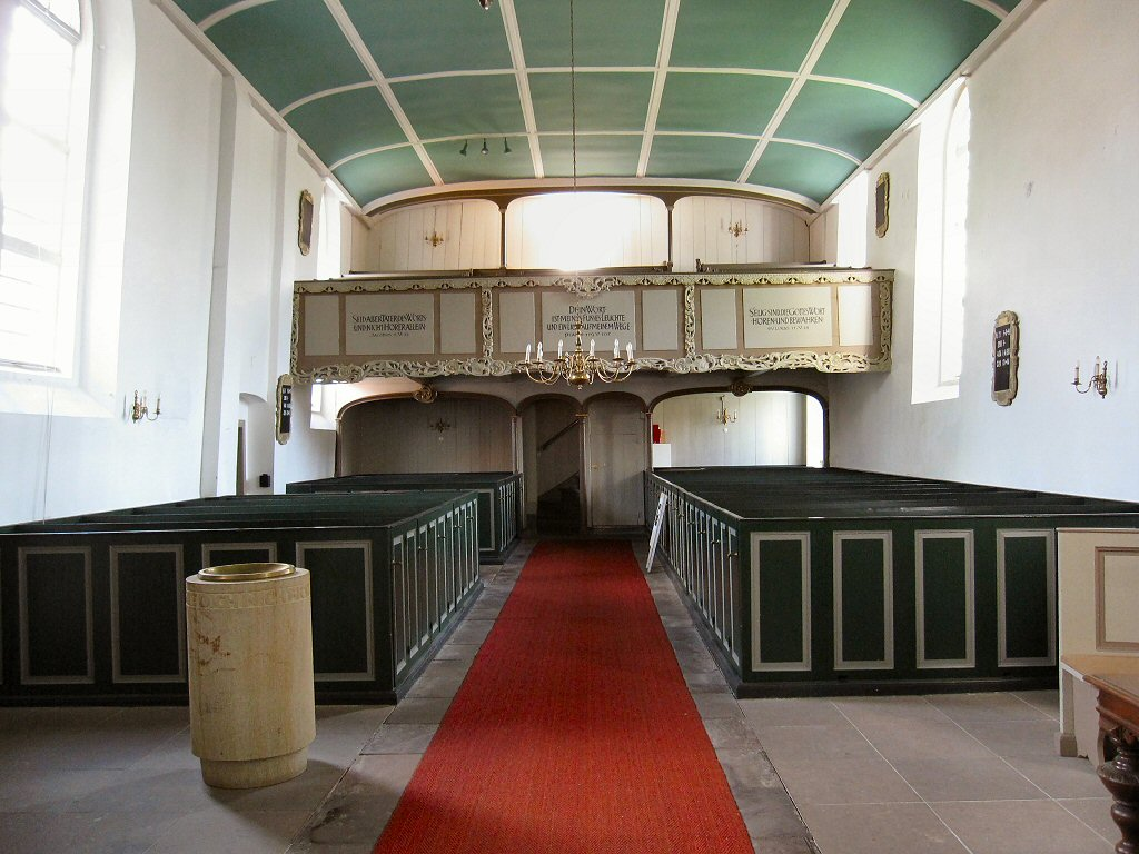 Greetsieler Kirche in Greetsiel (Ostfriesland): Blick in den Innenraum mit seinen stark geneigten Seitenwänden